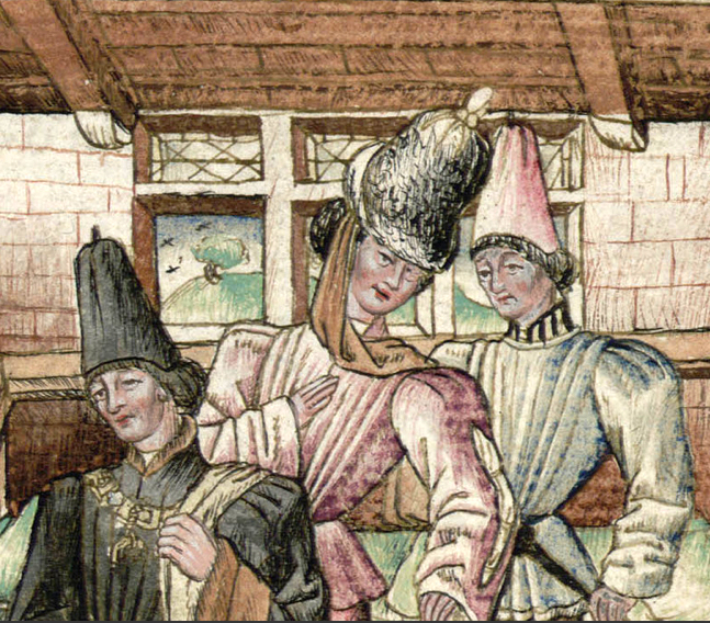 ChampionDesDames-Grenoble-Ms0352-f001r Présentation du Manuscrit détail